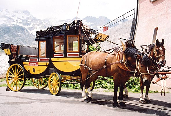 Nostalgie-Postkutsche auf dem Gotthardpass, Schweiz